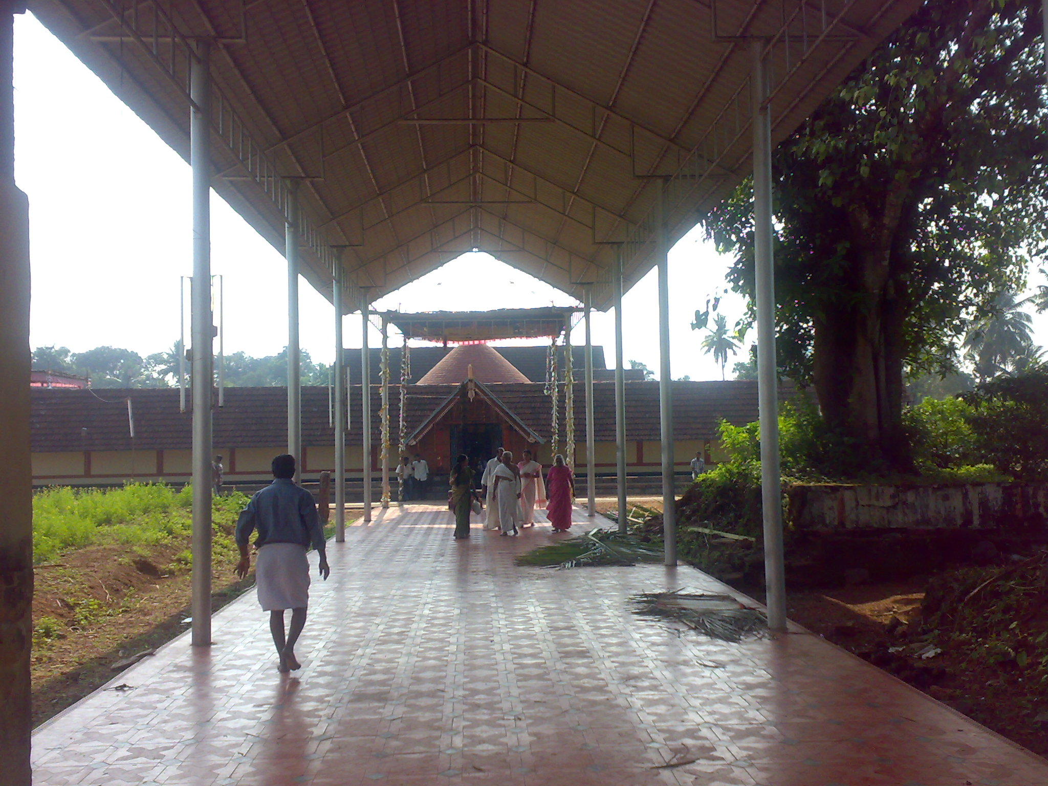 വാഴപ്പള്ളിക്ഷേത്രം നാലമ്പലം-പാർവ്വതീദേവി നട